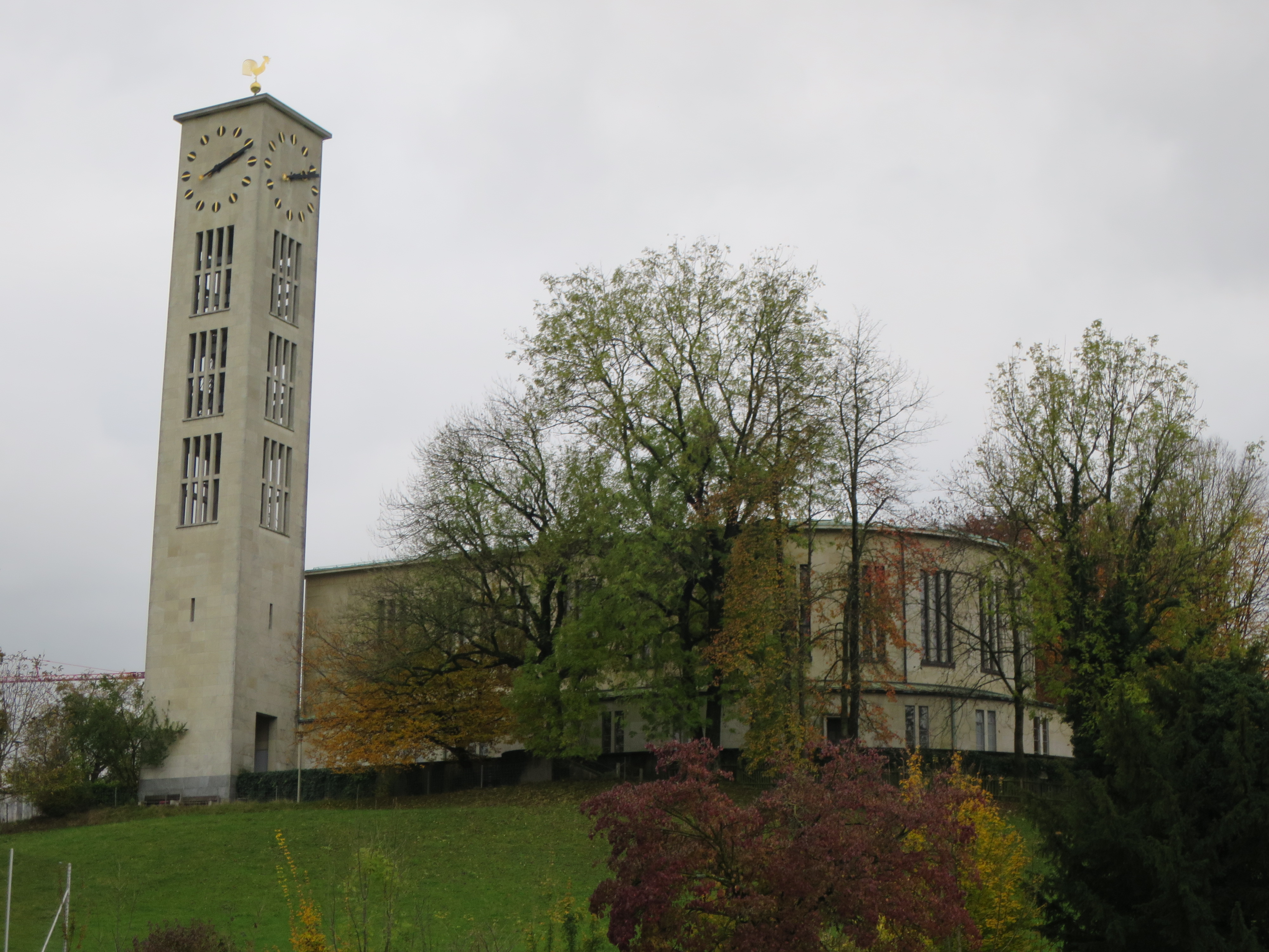 Aussenansicht von Norden